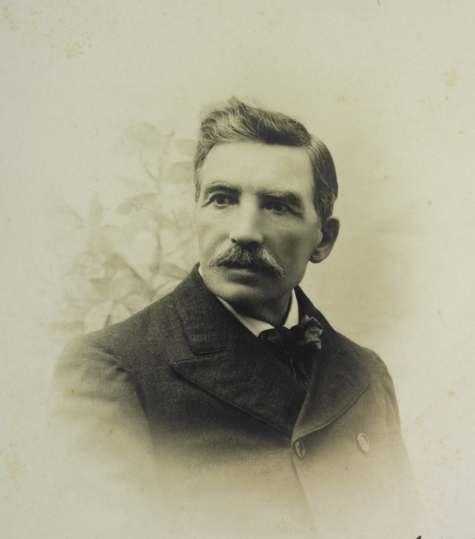 José Arechavaleta y Balpardo en Montevideo. Foto tomada por el Estudio Ramón Blanco el 15 de mayo de 1903